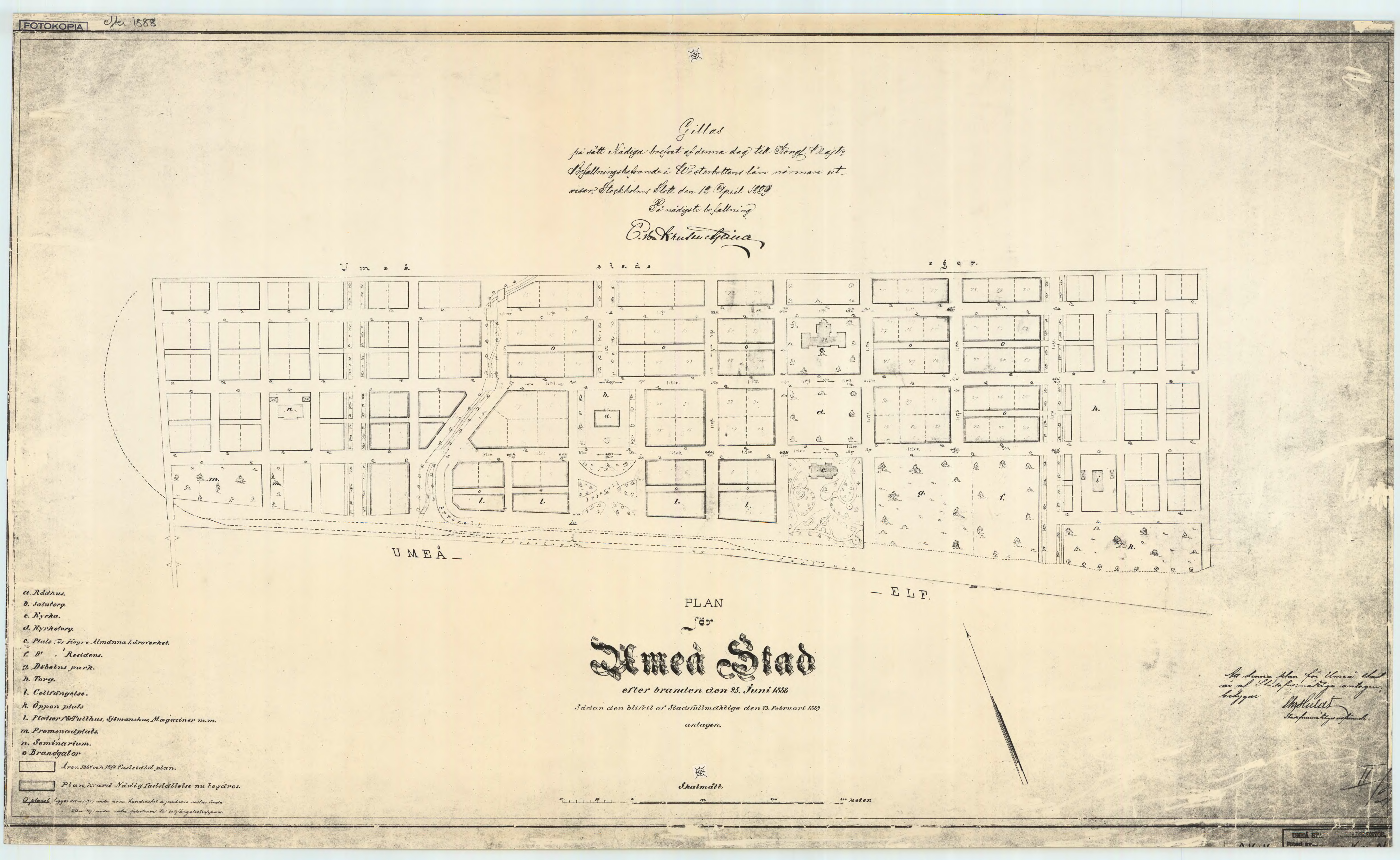 Fotokopia av: Plan för Umeå Stad efter branden den 25. Juni 1888; Sådan den blifvit af Stadsfullmäktige den 23. Februari 1889 anlagen.